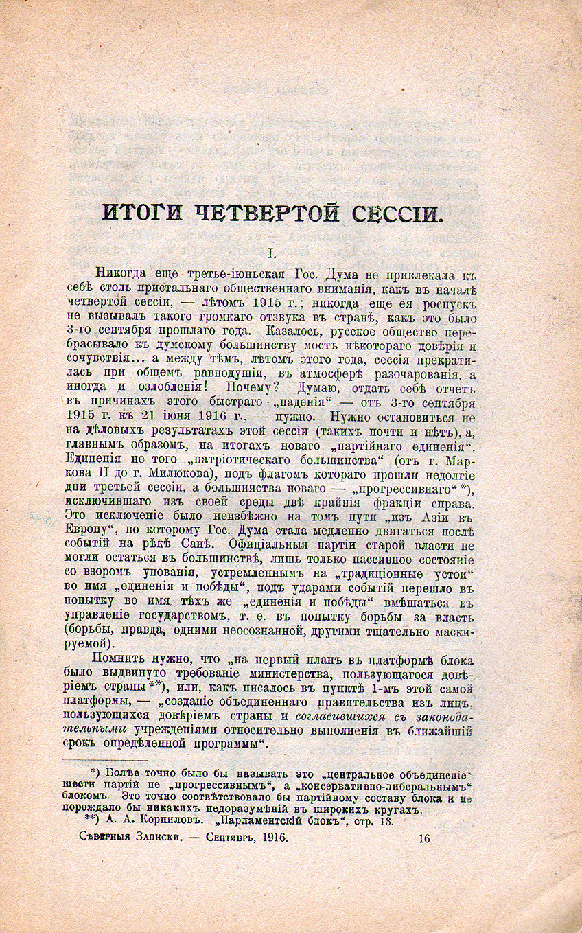 Статья А.Ф.Керенского "Итоги четвёртой сессии", "Северные записки, 1916, сентябрь